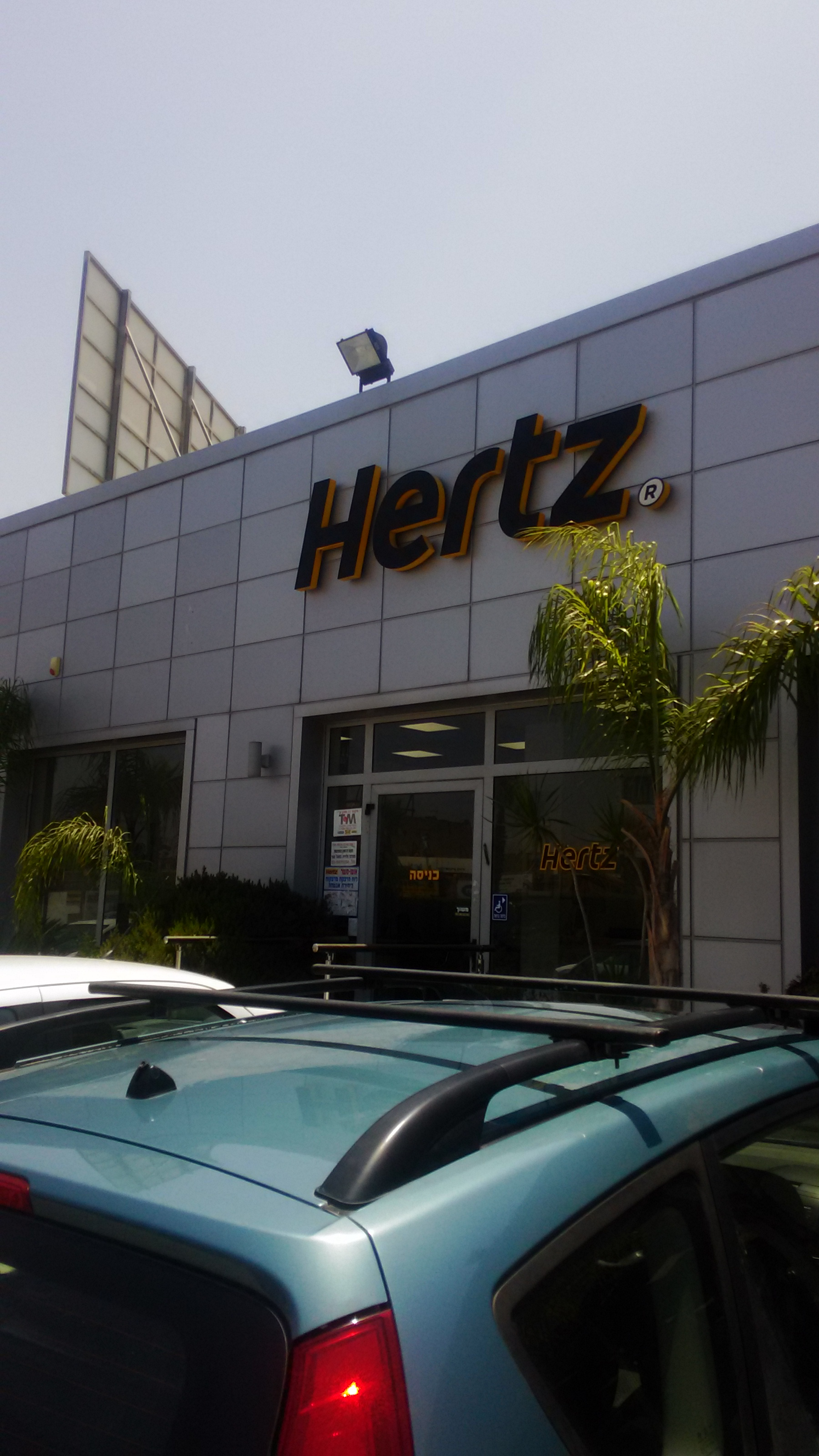 סניף הרץ במפרץ חיפה